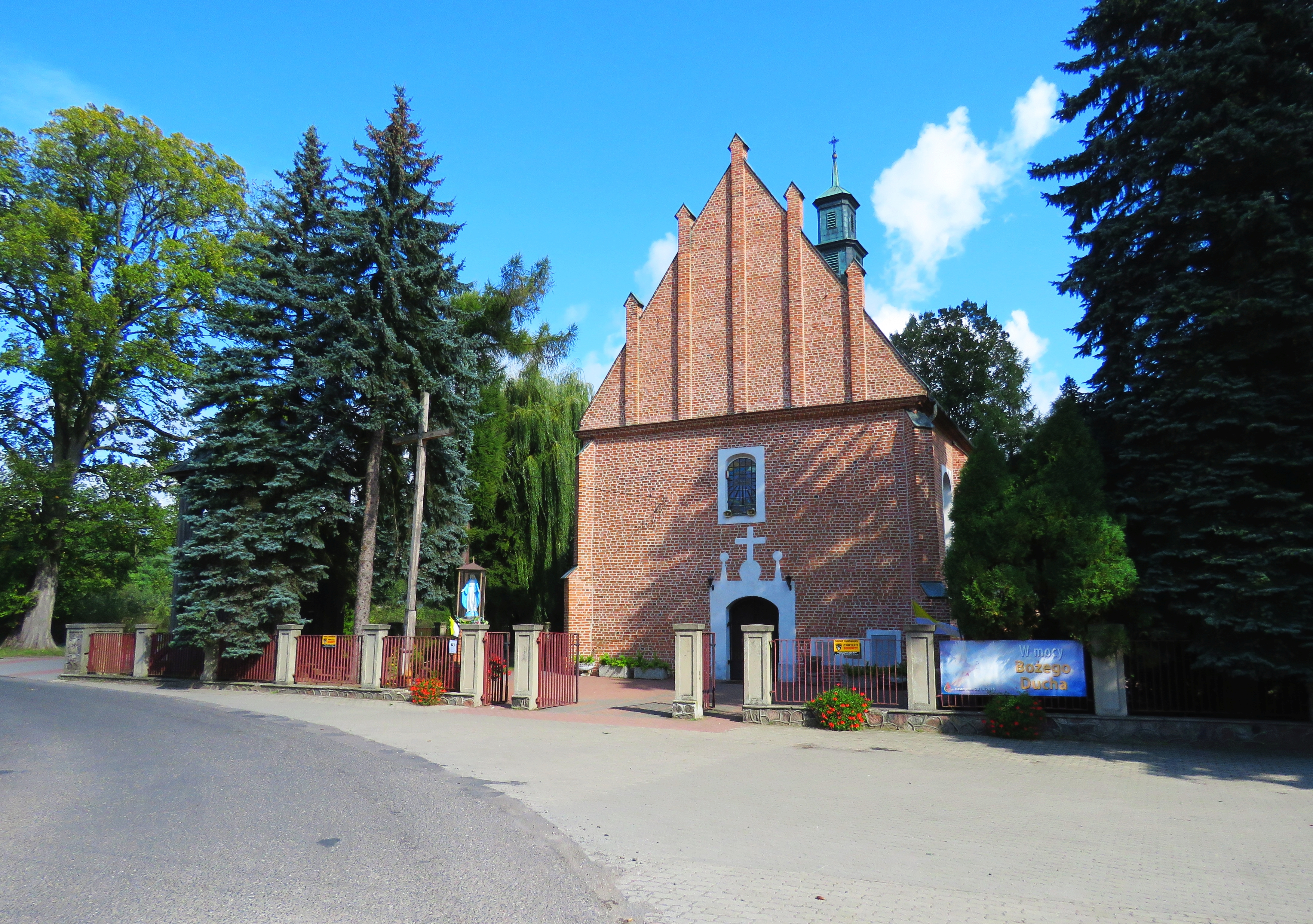 Chojnata - rzymskokatolicki kościół parafialny p.w. św. Marcina, XIV, 1673, 2 poł. XIX